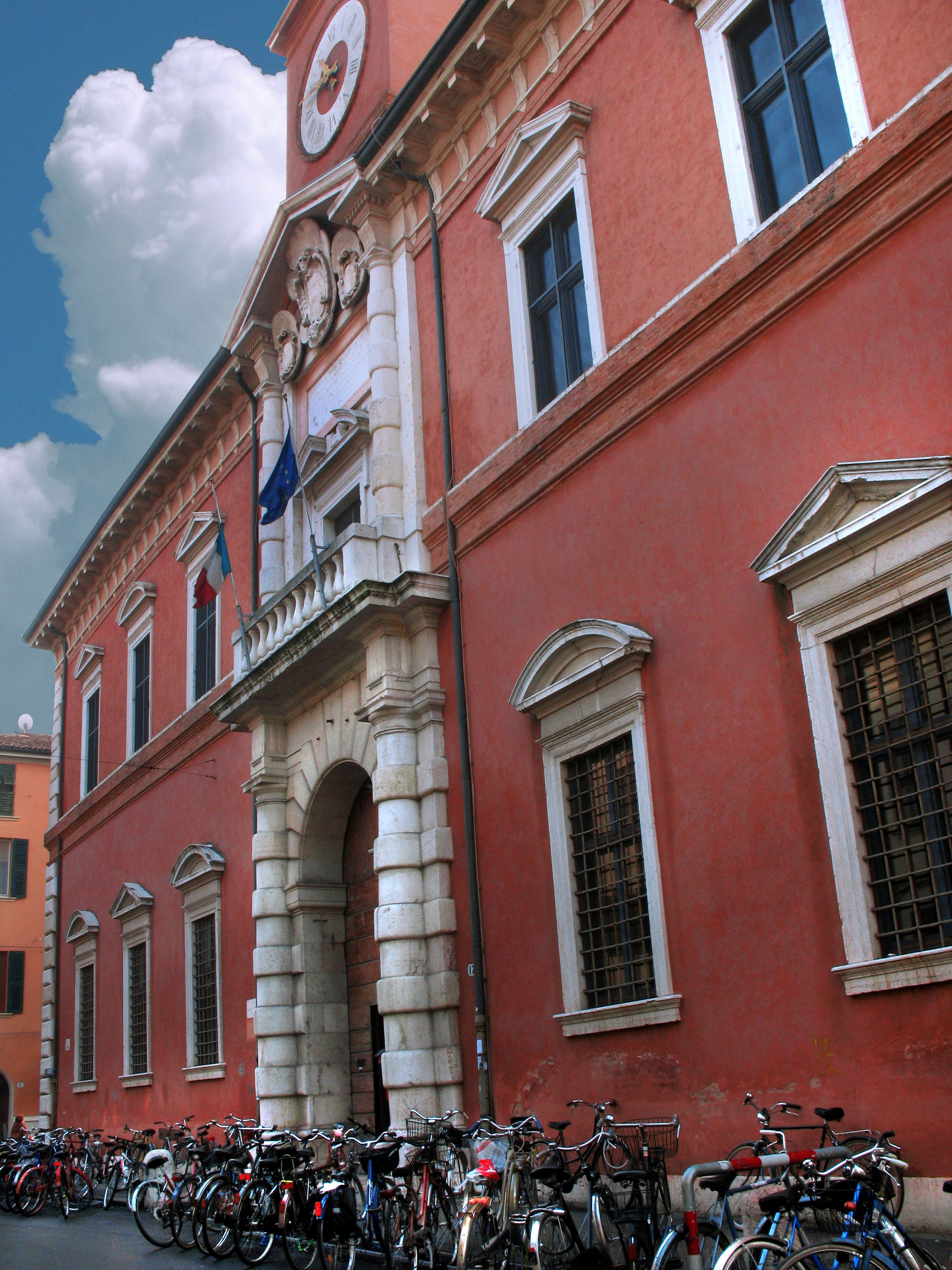 Palazzo Paradiso: visione prospettica della facciata con portale. This is a photo of a monument which is part of cultural heritage of Italy.